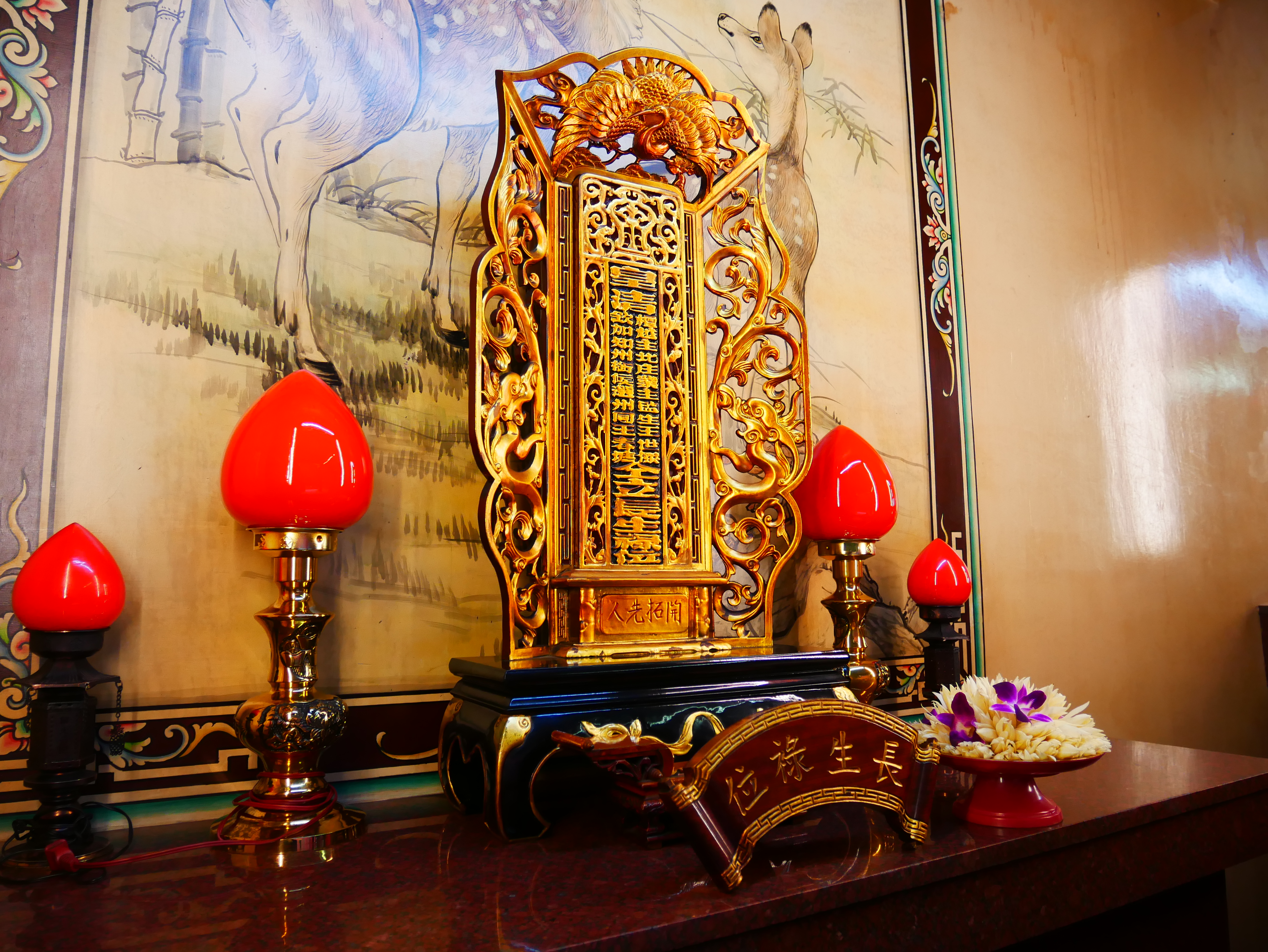 中文（台灣）: 新竹竹蓮寺王世傑、王春塘長生祿位，新竹市東區竹蓮聯里竹蓮里